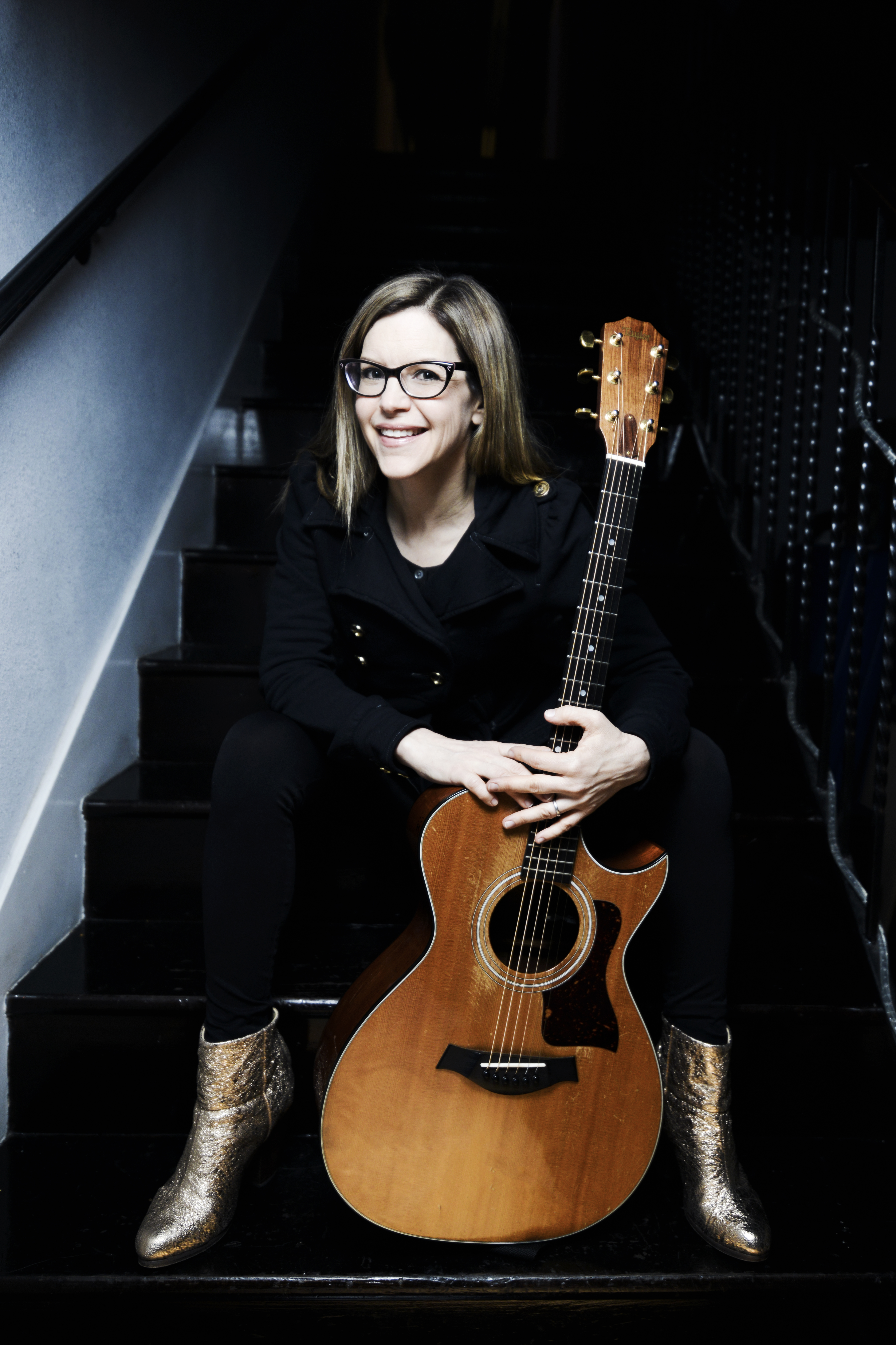 Lisa Loeb